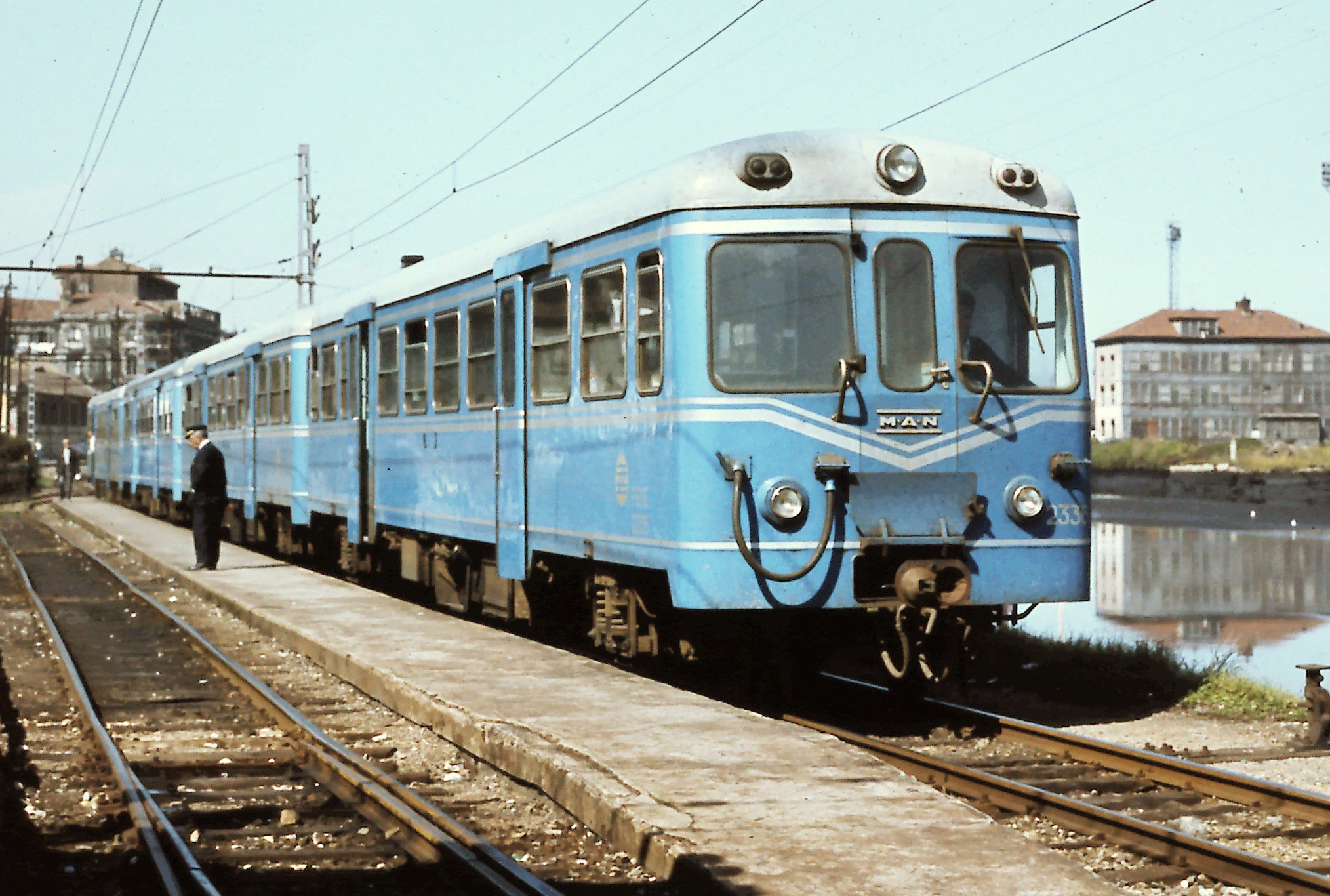 Ferrocarriles de Vía Estrecha (FEVE) motorrijtuig 2336 op 26 september 1977 te Aviles